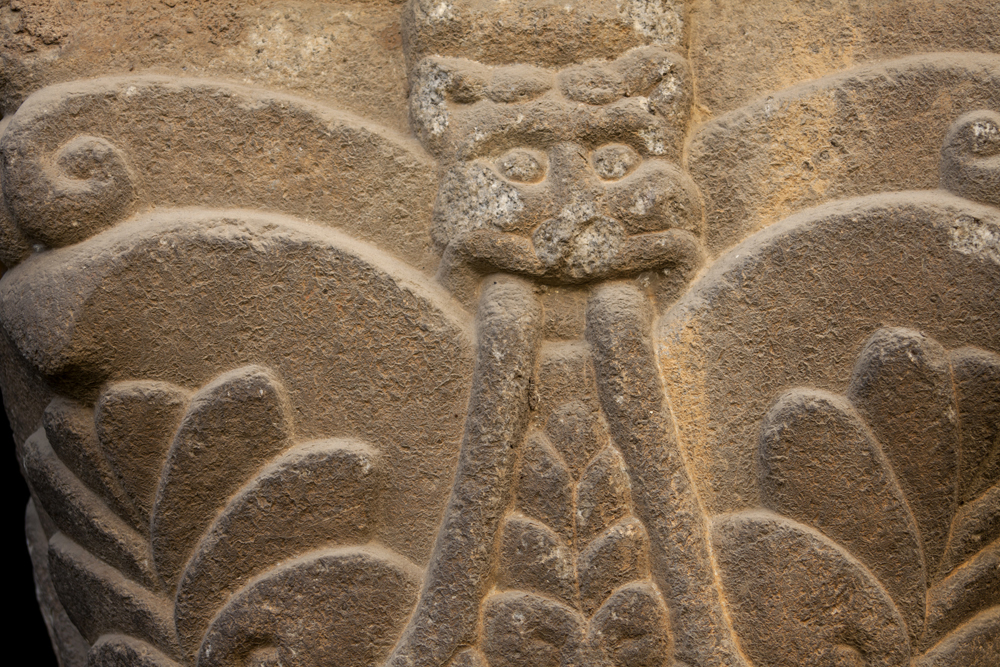 unidentified Spain